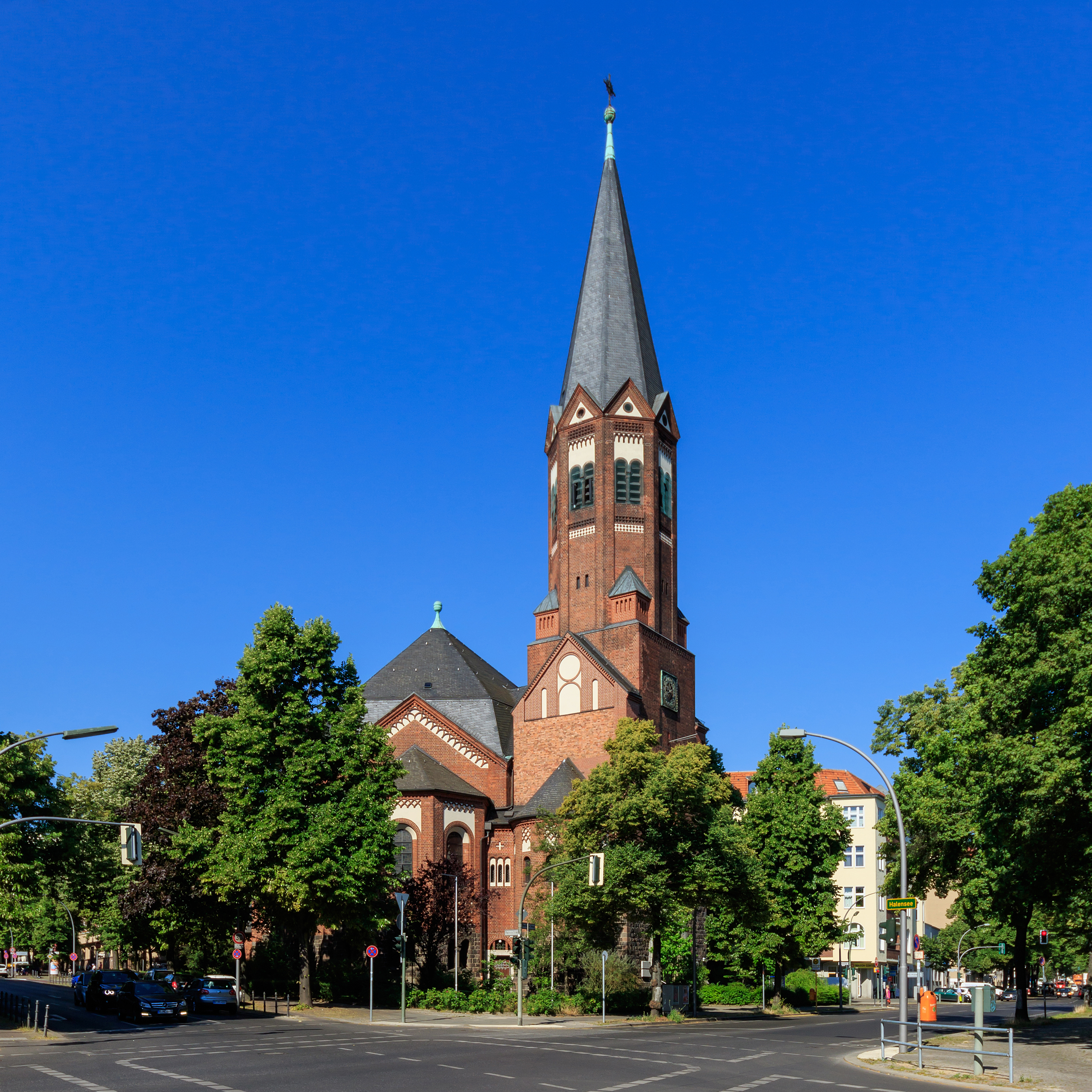 Hochmeister-Kirche in Berlin-Halensee (Westfälische/Paulsborner Str.)